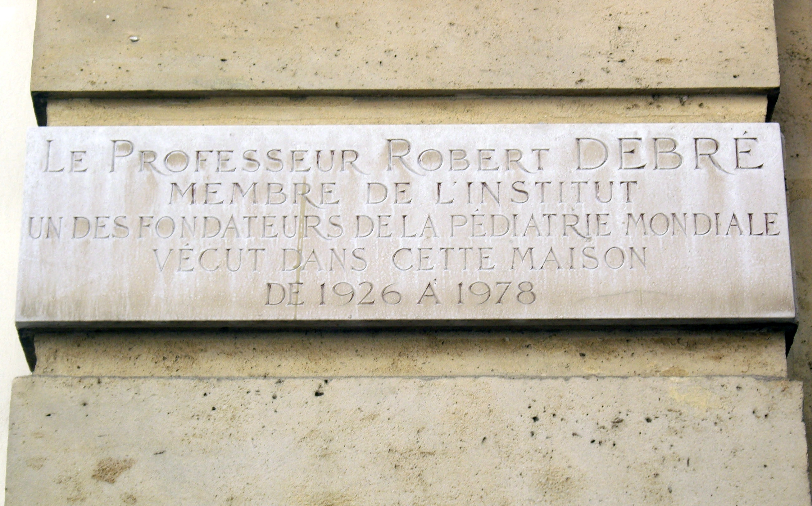 Plaque apposée au n° 5 de la rue de l'Université, Paris 7e, où vécut le professeur Robert Debré (1882-1978) de 1926 à 1978.